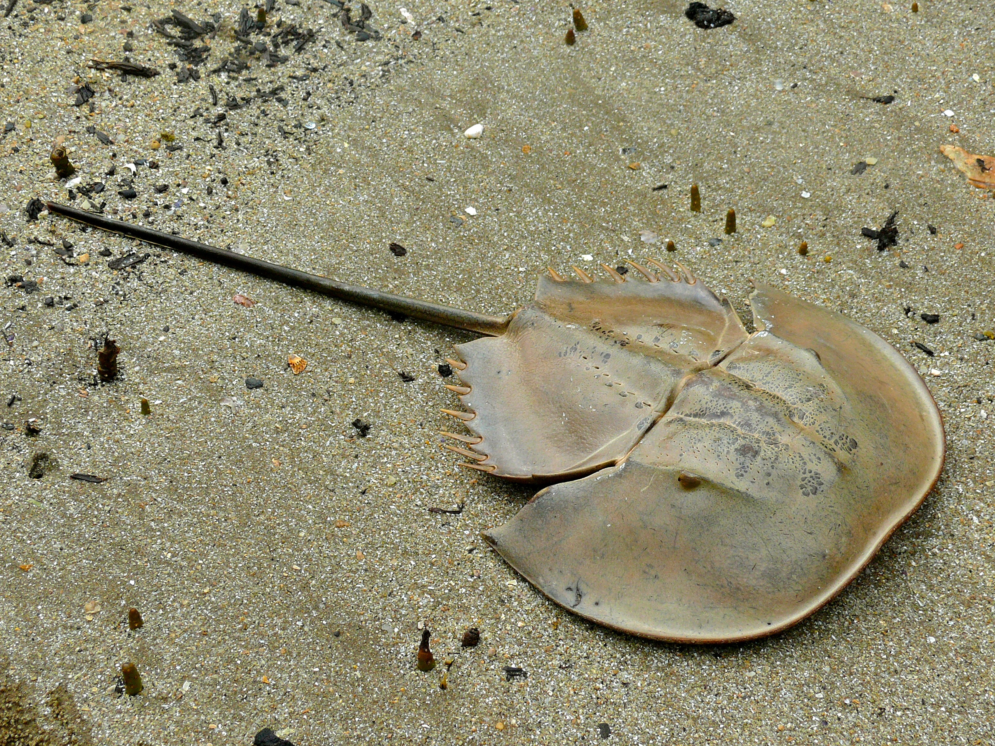 Bako NP, Sarawak, MALAYSIA